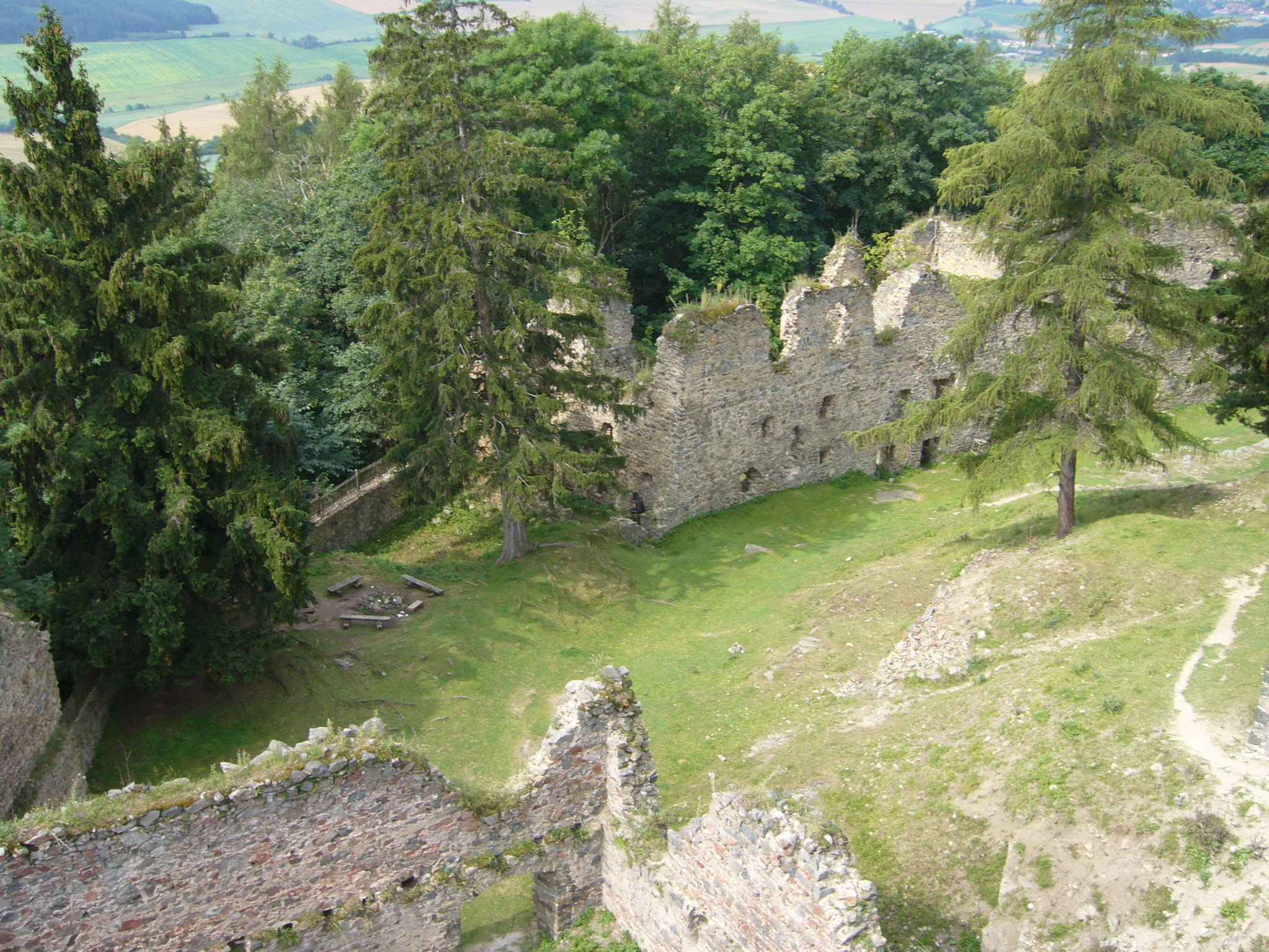 Helfenburk – hospodářská budova v jihozápadní části hradu